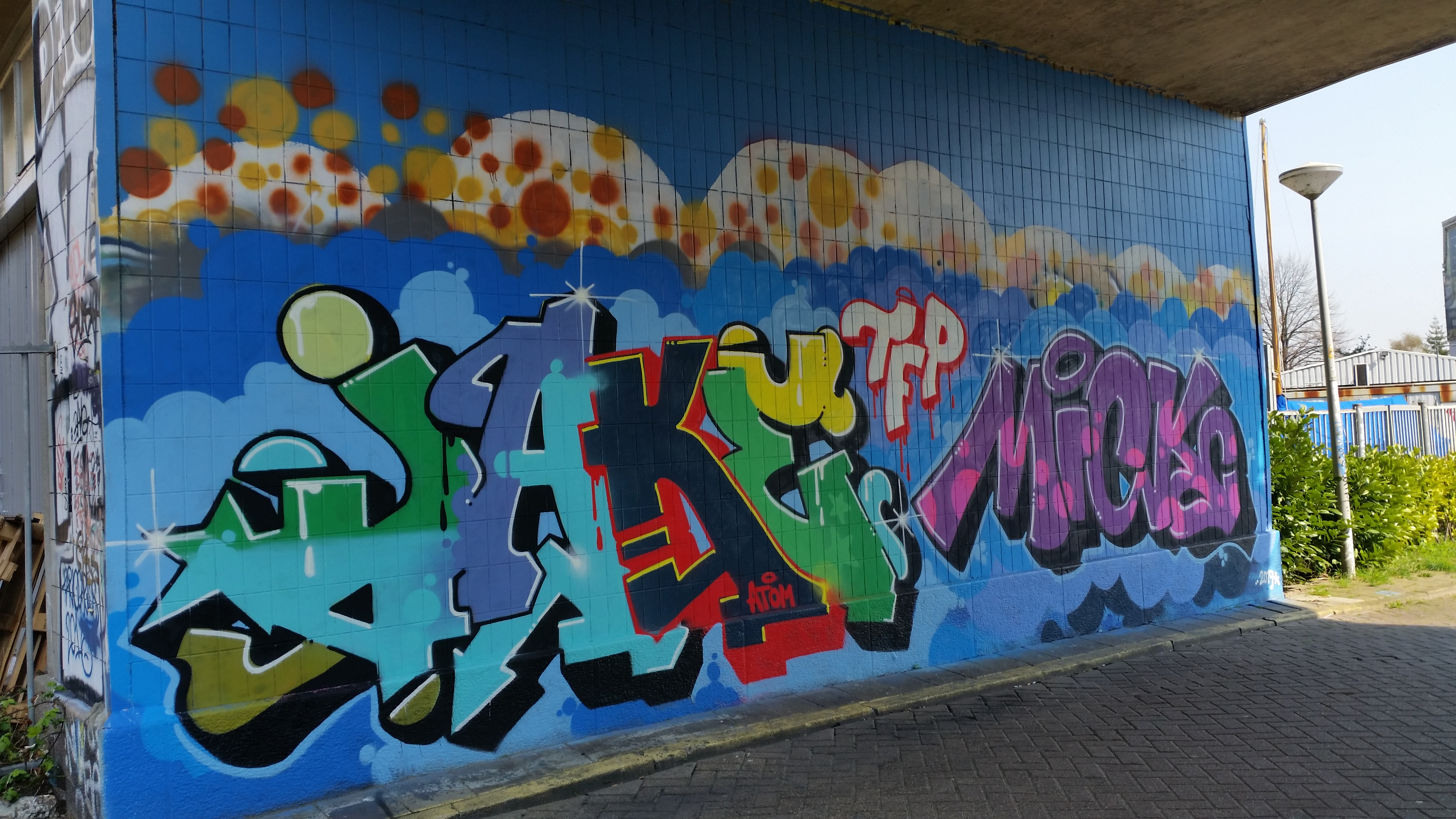 Omvalspoorbrug, beschildering